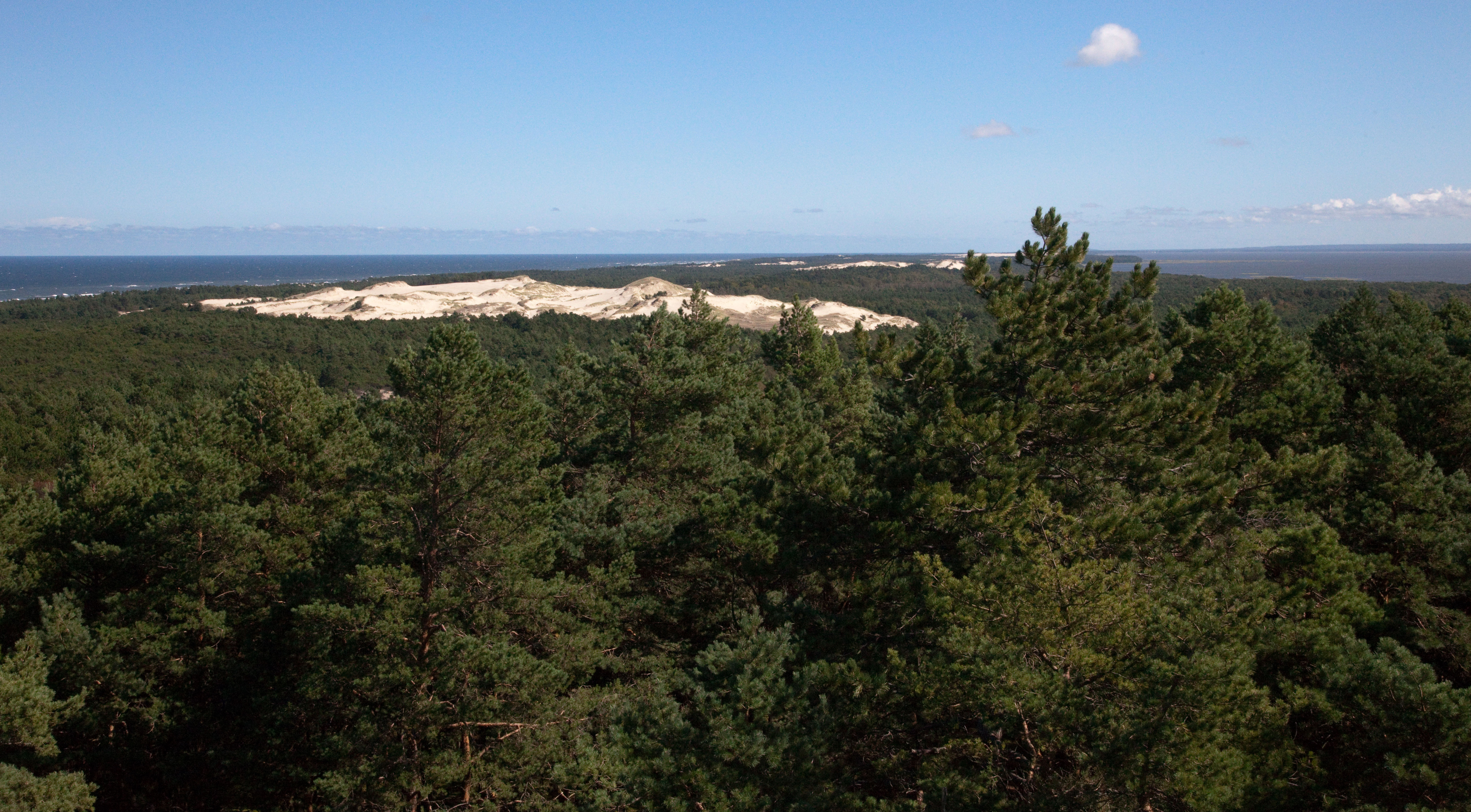 Specjalny obszar ochrony siedlisk Ostoja Słowińska. Widok z Latarni Morskiej Czołpino na ruchome wydmy Słowińskiego Parku Narodowego. This is a photography of Natura 2000 protected area with ID PLH220023